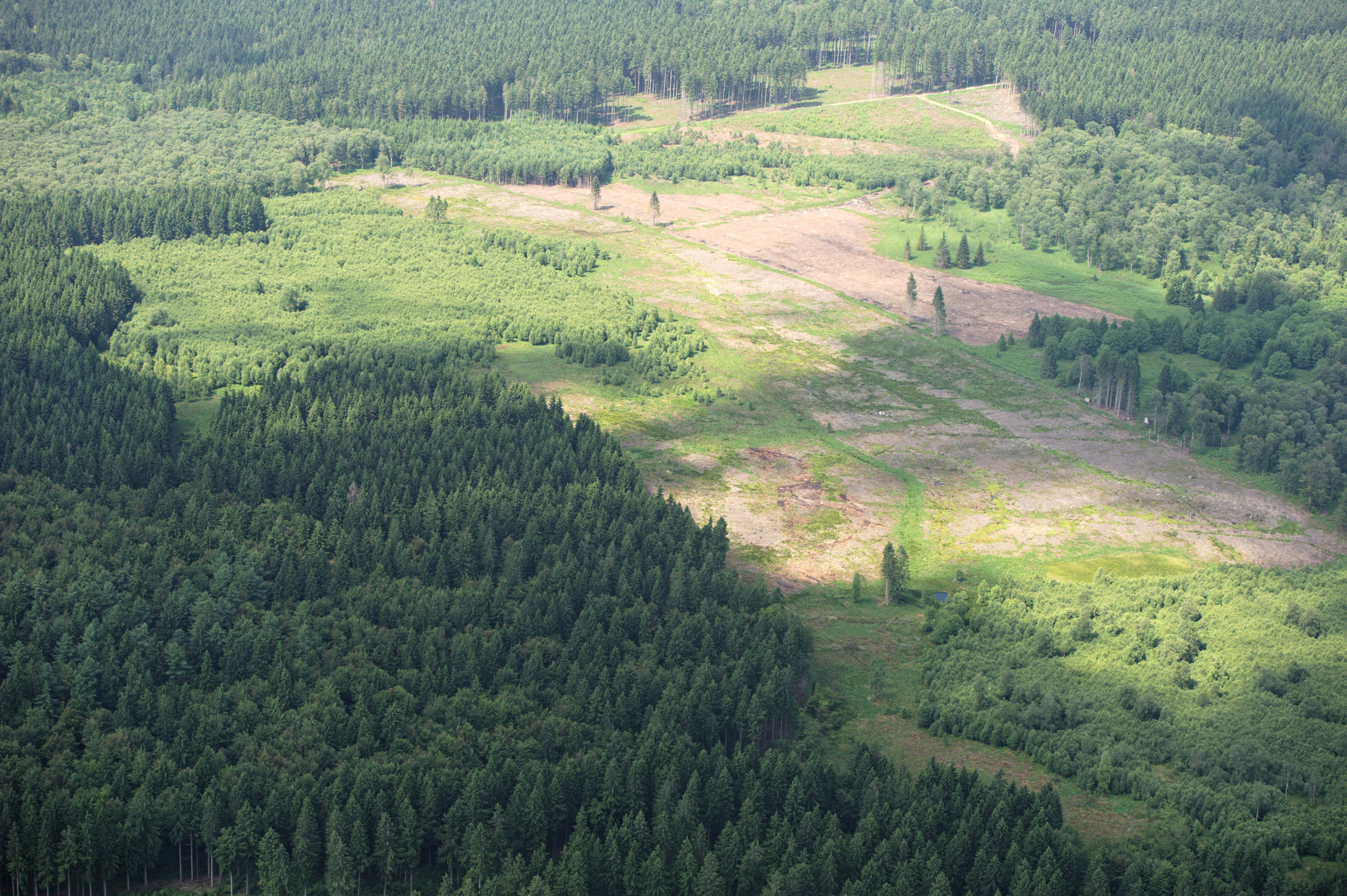 Fotoflug Sauerland-Ost: Blick über den Bereich Harmorsbruch in den beiden Naturschutzgebieten „Hamorsbruch“ in Meschede (vorne/links) und „Hamorsbruch und Quellbäche“ in Warstein (hinten/rechts), ca. 1 km nordwestlich des Stimmstamms